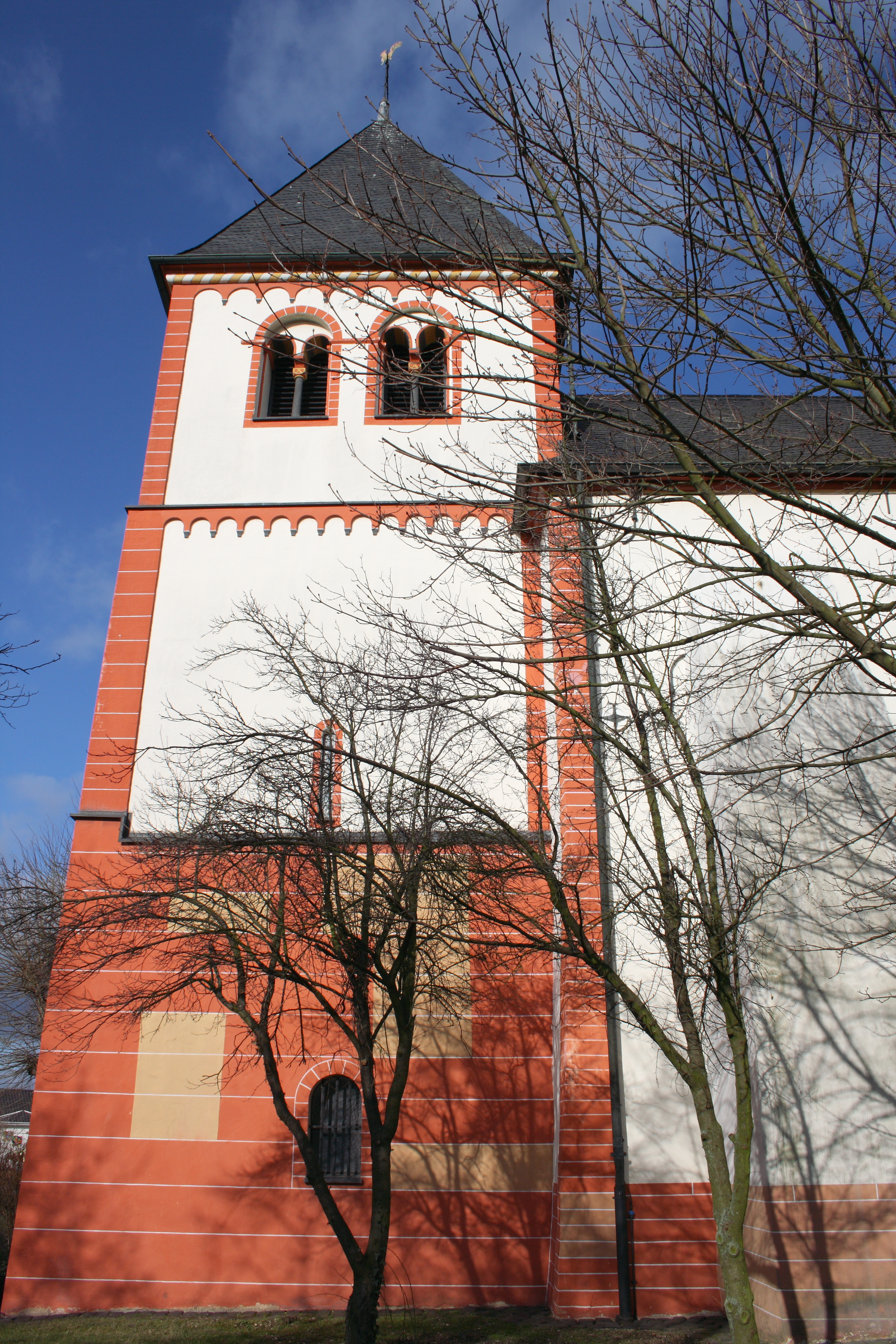 katholische Pfarrkirche St. Peter in Lüftelberg, Turm